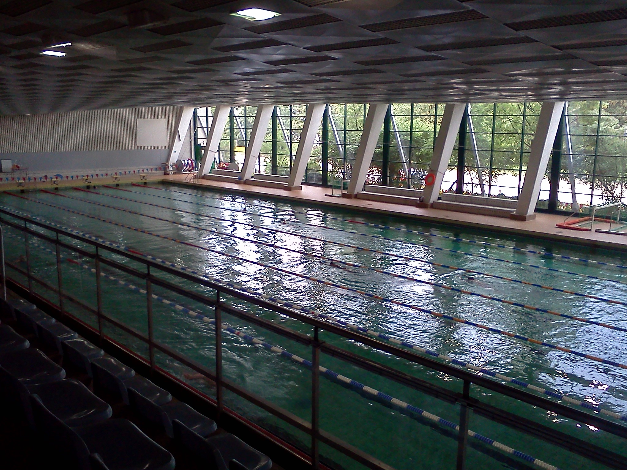 Schwimm- und Sprunghalle Freiberger Platz in Dresden / Blick von der Zuschauertribüne